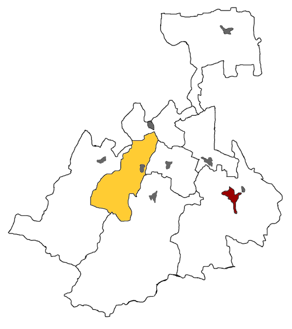 Дигорский район Северной Осетии. Красным выделен Владикавказ, тёмно-серым — райцентры. Ирон: Цæгат Ирыстоны Дыгуыры район.